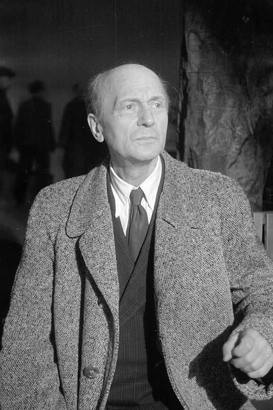 Original image description from the Deutsche Fotothek Porträt